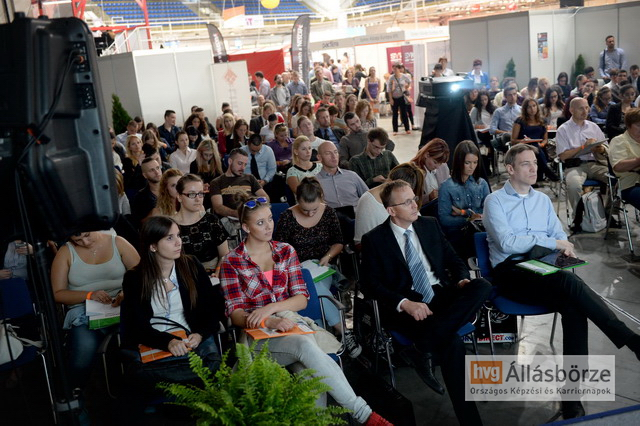 Karrierépítést támogató előadsok